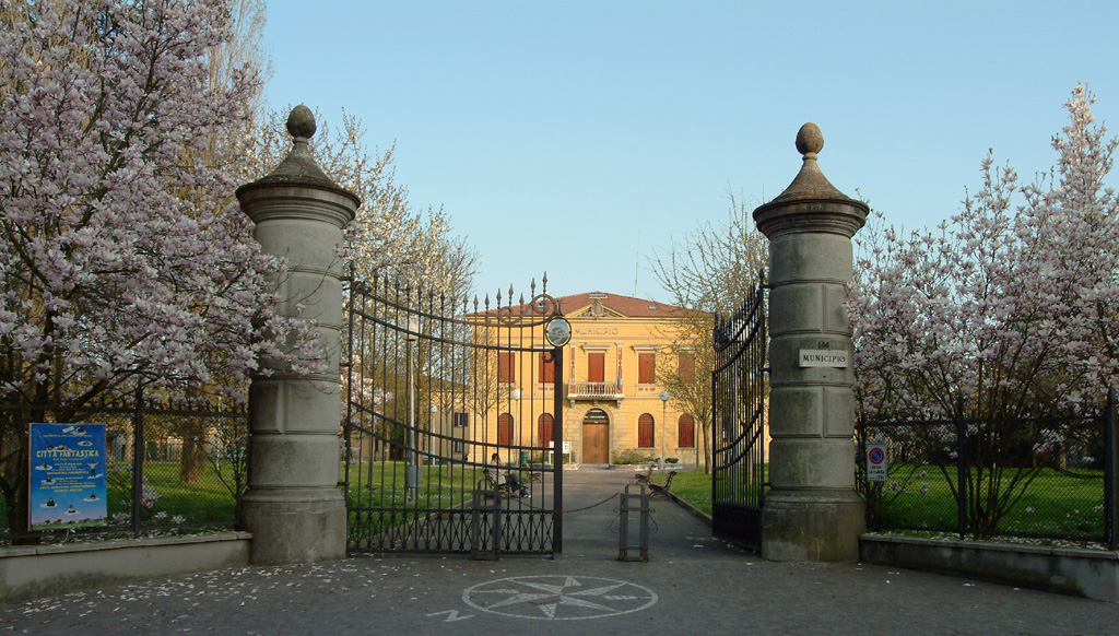 Villa Bonora. Municipio di San Pietro in Casale Licensing Fotografo: Vincenzo Tuccio (grazie a mio fratello per la concessione)